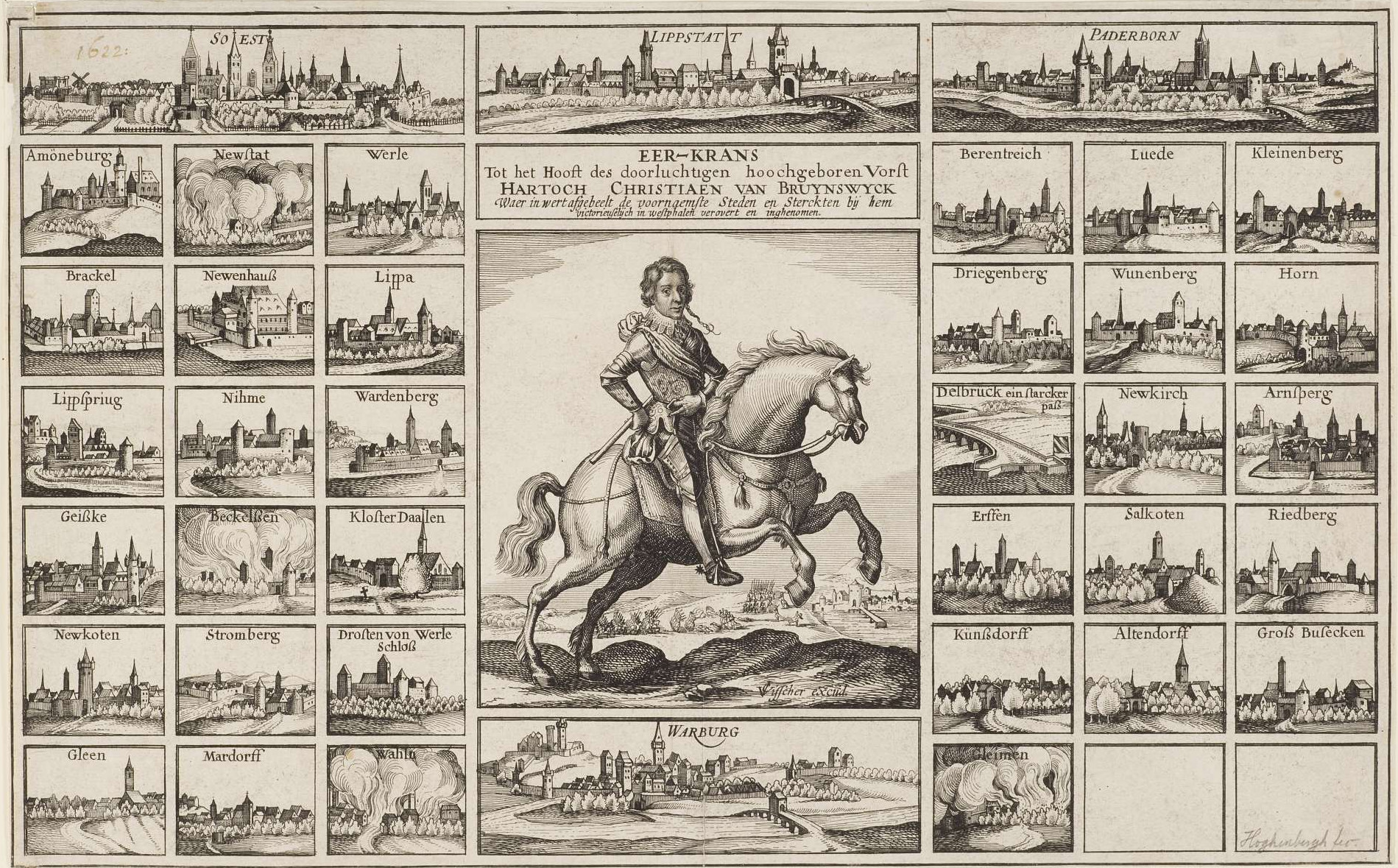 Christian von Braunschweig-Wolfenbüttel umgeben von westfälischen Städteansichten